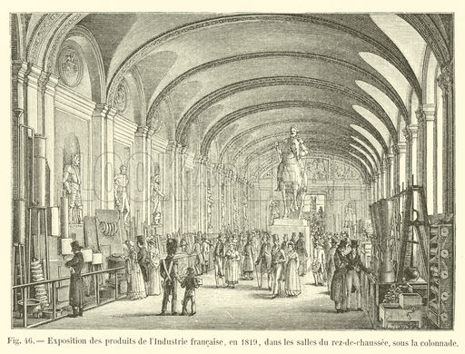 Exposition des produits de l'Industrie francaise, en 1819, dans les salles du rez-de-chaussee, sous la colonnade. Illustration for Paris A Travers Les Ages (Firmin-Didot, 1875).